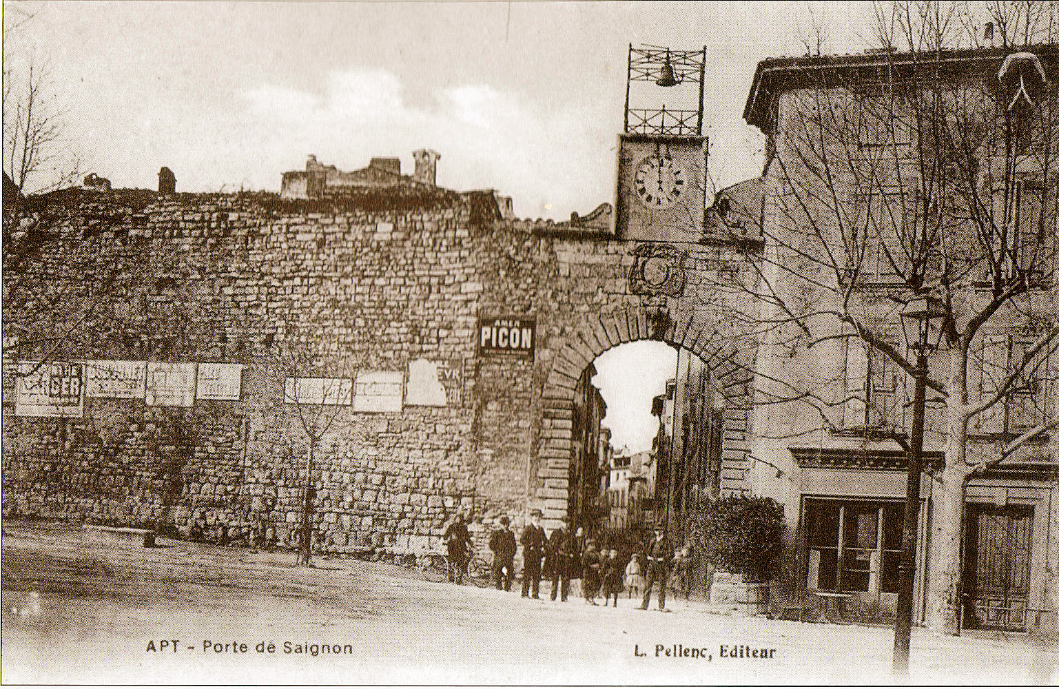 Porte de Saignon et remparts d'Apt